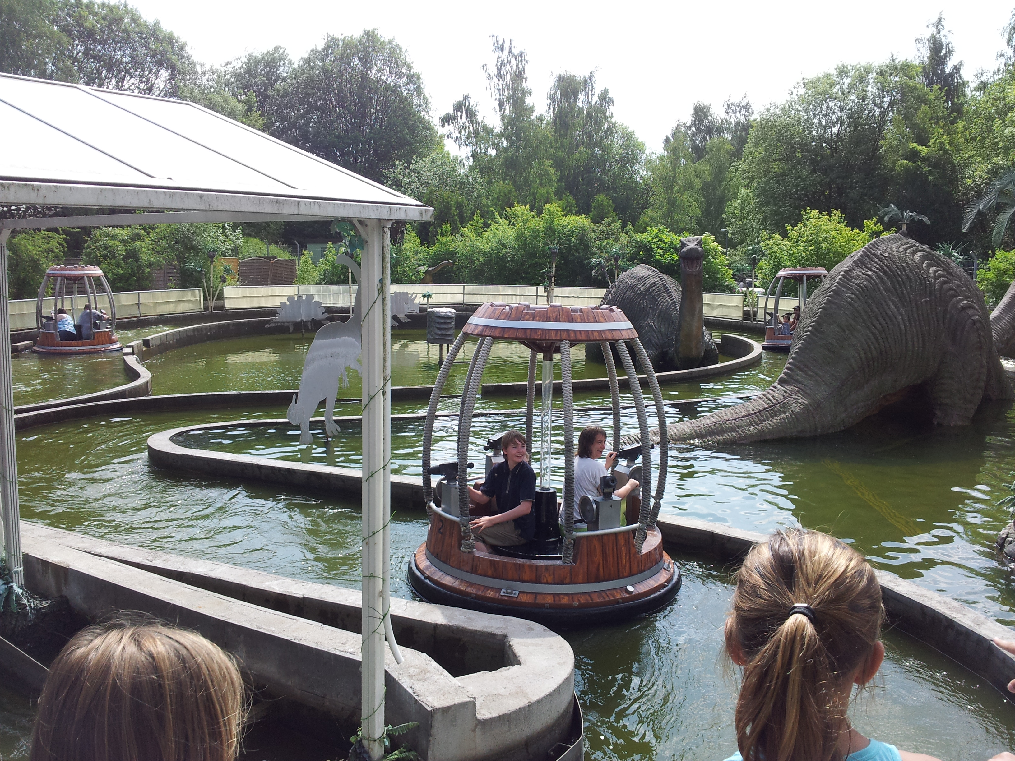 Rastiland Wasserschlacht